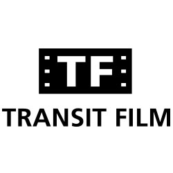 Transit Film Logo